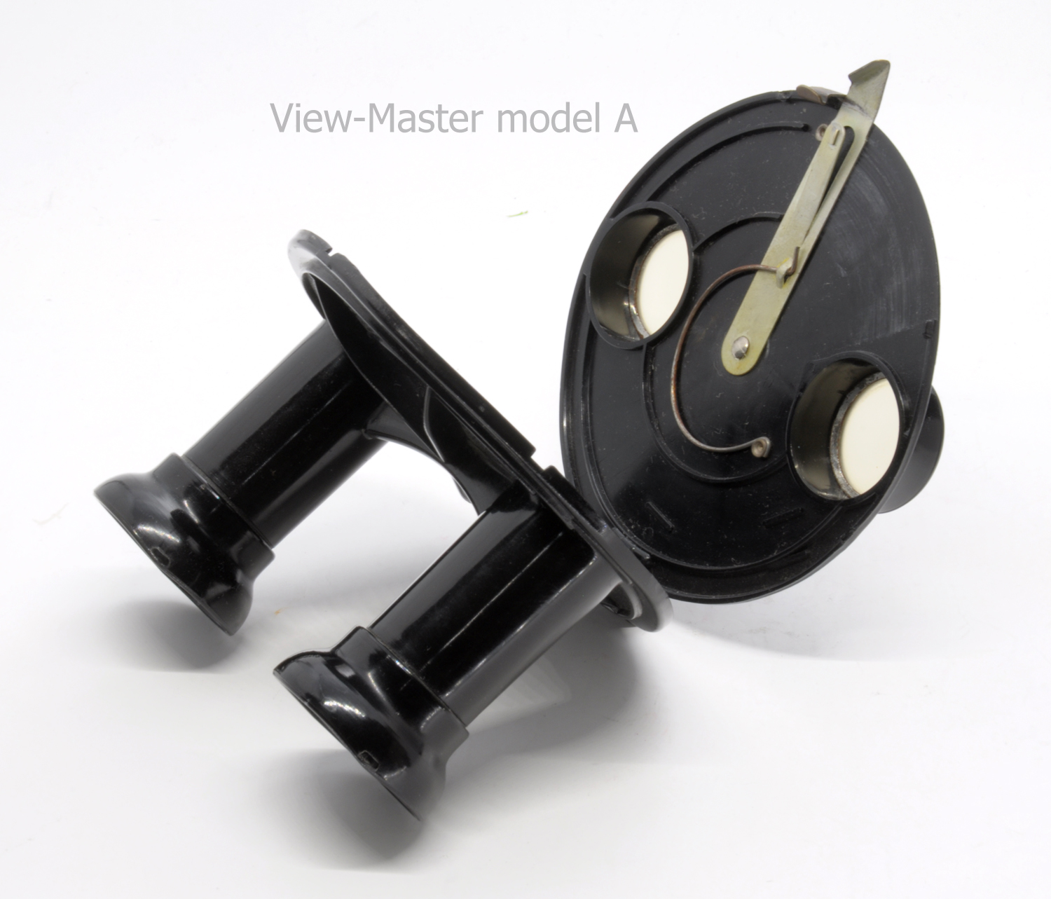 วิว-มาสเตอร์ โมเดล เอ (A) สีดำ วัสดุ โกดัก เทไนต์